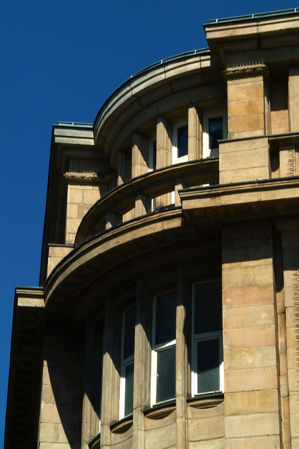 Detail an dem Kaufhaus in der Großen Packhofstraße/Ecke Osterstraße in Hannover